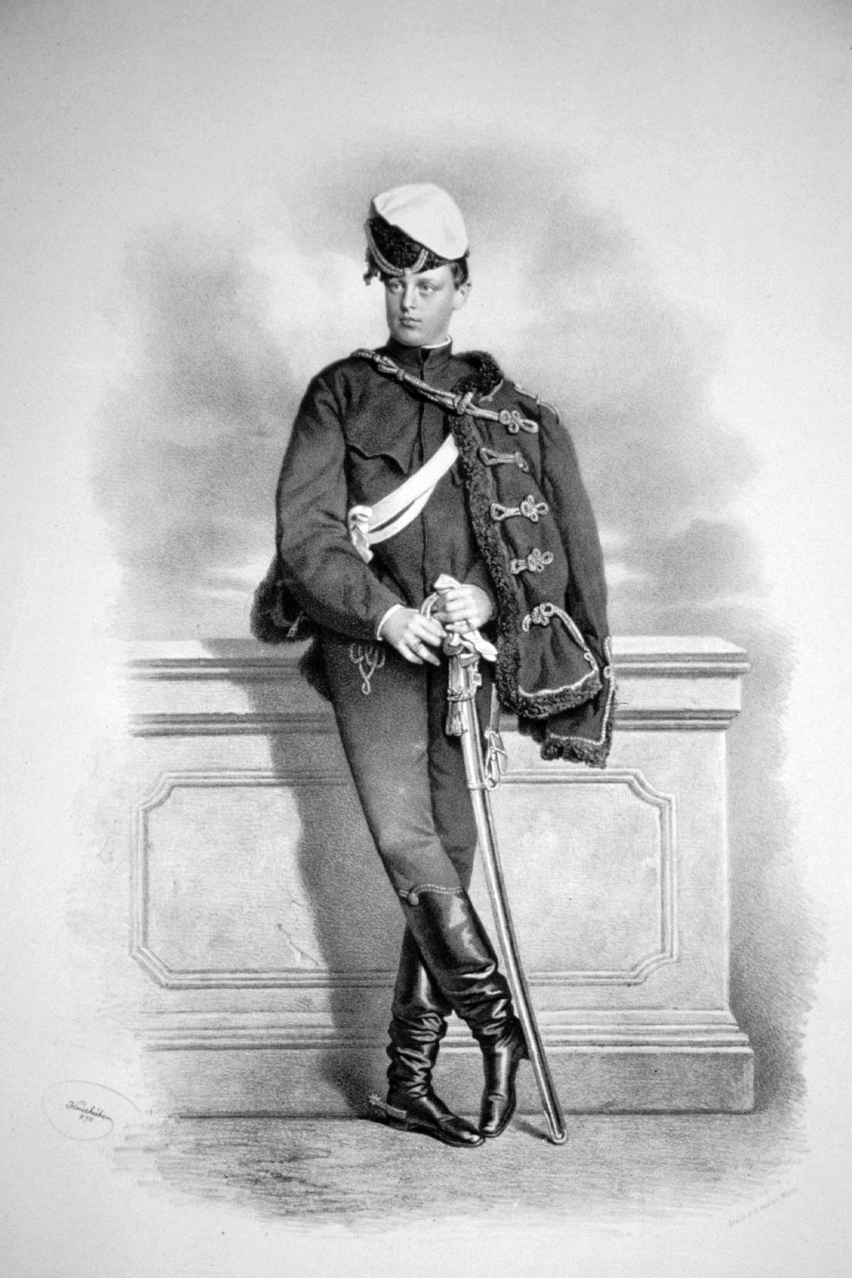 Alain Benjamin Arthur de Rohan (1853-1914) Fürst. Lithographie von Josef Kriehuber, 1870